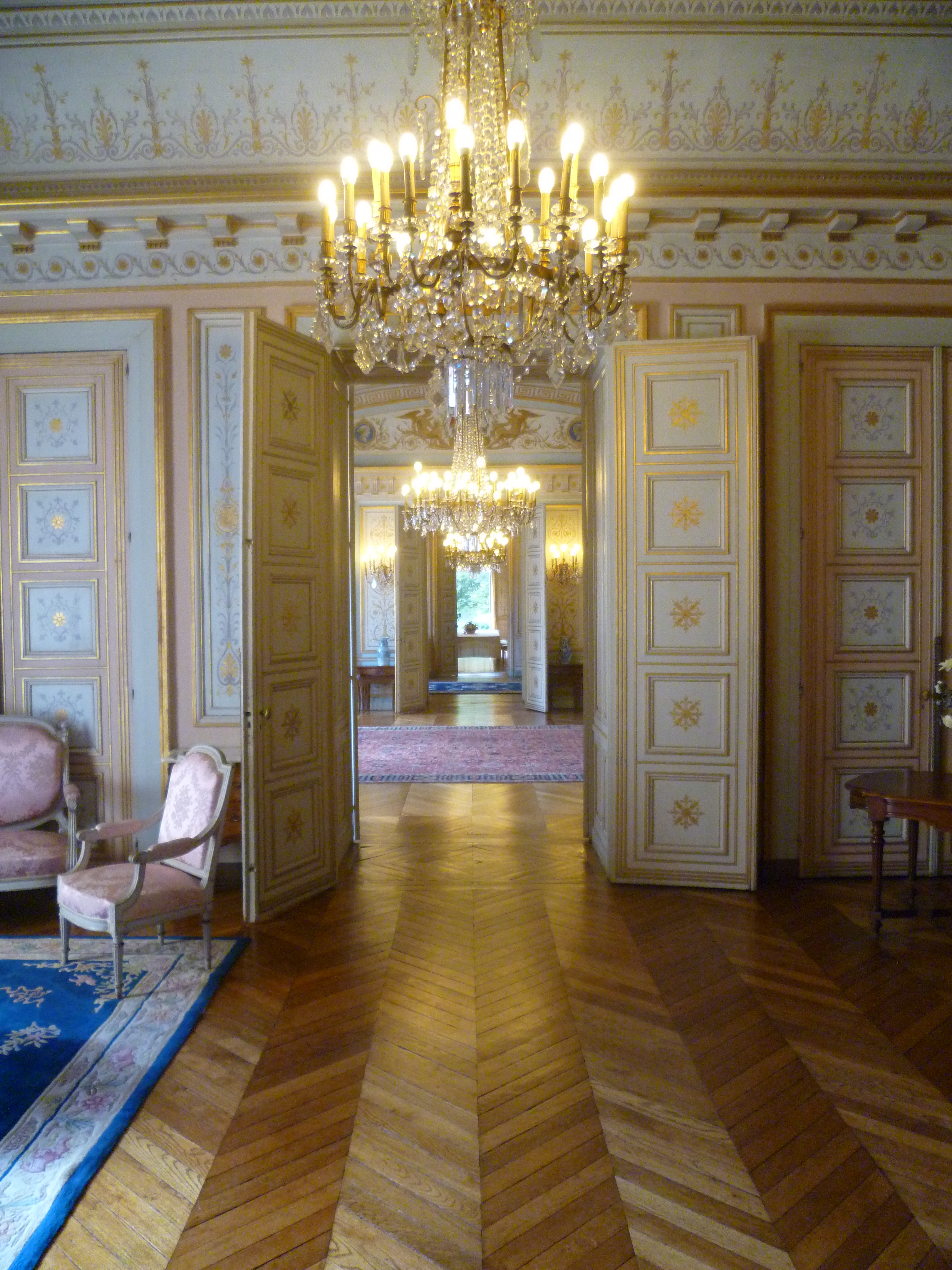 hôtel de préfecture du Calvados à Caen ; salon mauve